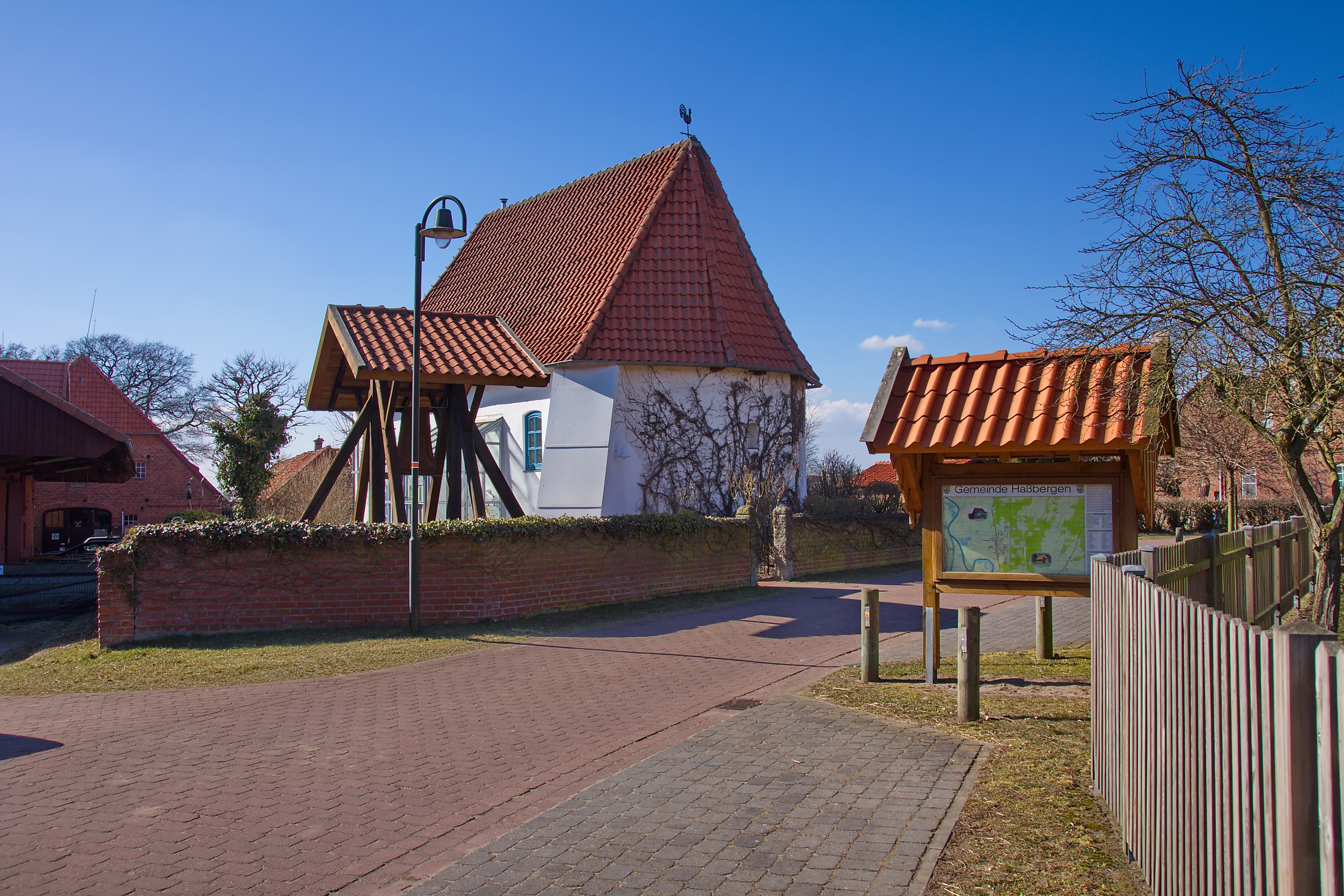 Haßbergen, Niedersachsen, Deutschland